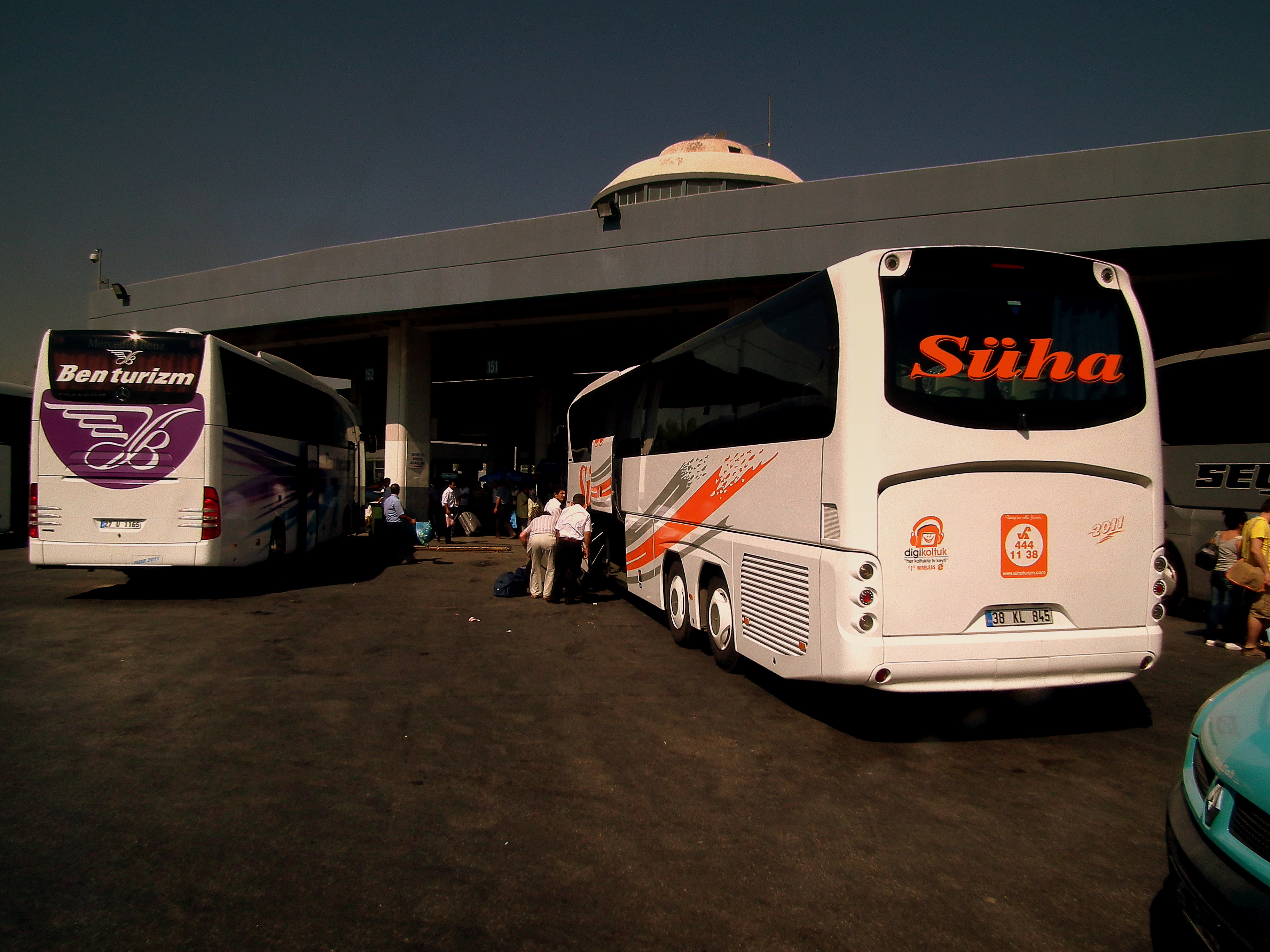 IZMIR OTOGAR/BUS STATION TURKEY AUG 2011